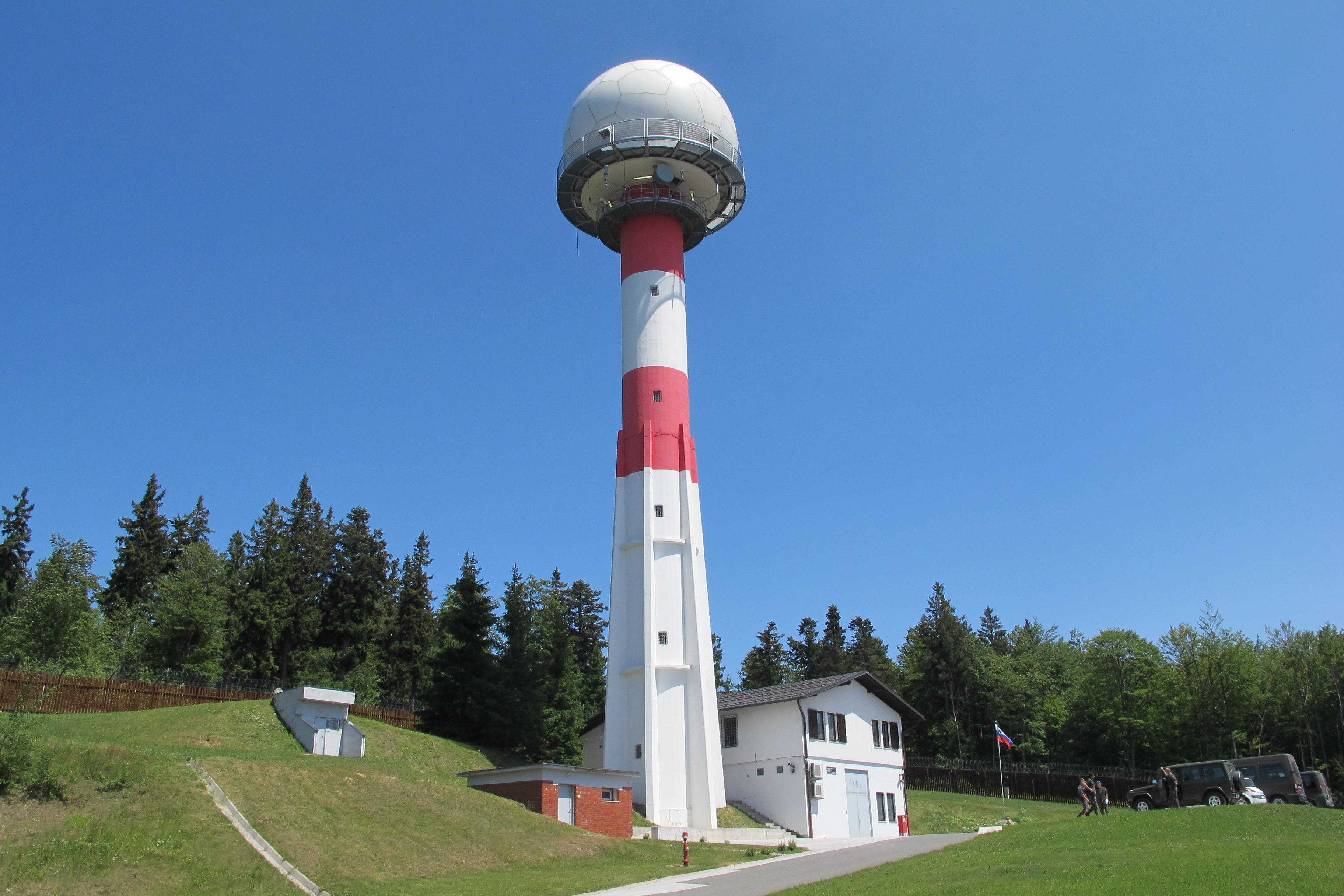 Radarski položaj Ledinekov Kogl